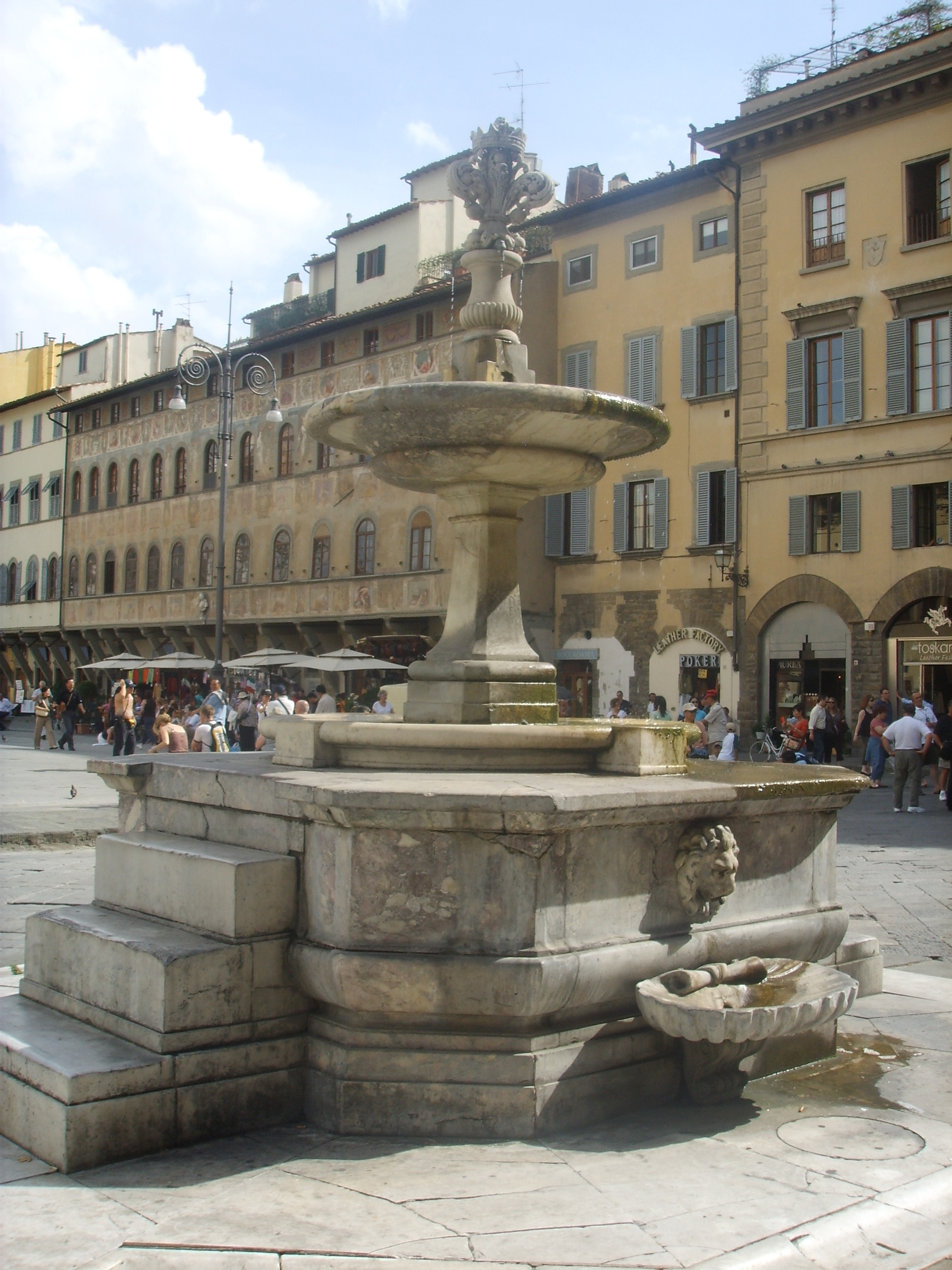 Piazza Santa Croce fountain in Florence, italy